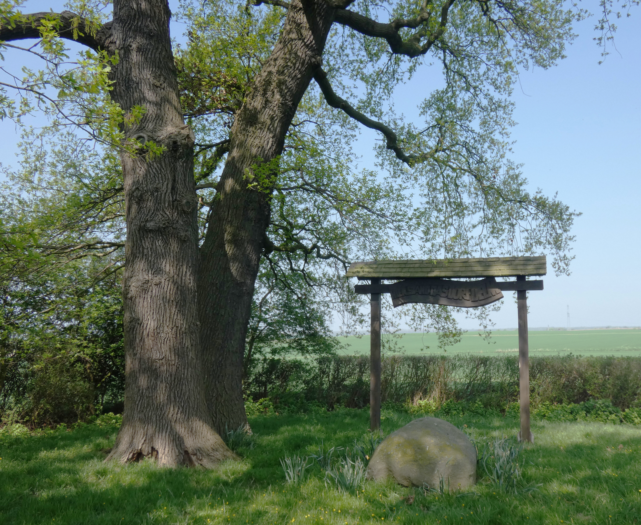 Gedenktafel unter den Delmer Eichen für die Wüstung Delm. Die Delmer Eichen sind ein Naturdenkmal südlich des Laatzener Stadtteils Ingeln. Sie erinnern an die im 15. Jahrhundert in der Hildesheimer Stiftsfehde wüst gewordene Ortschaft Delm.